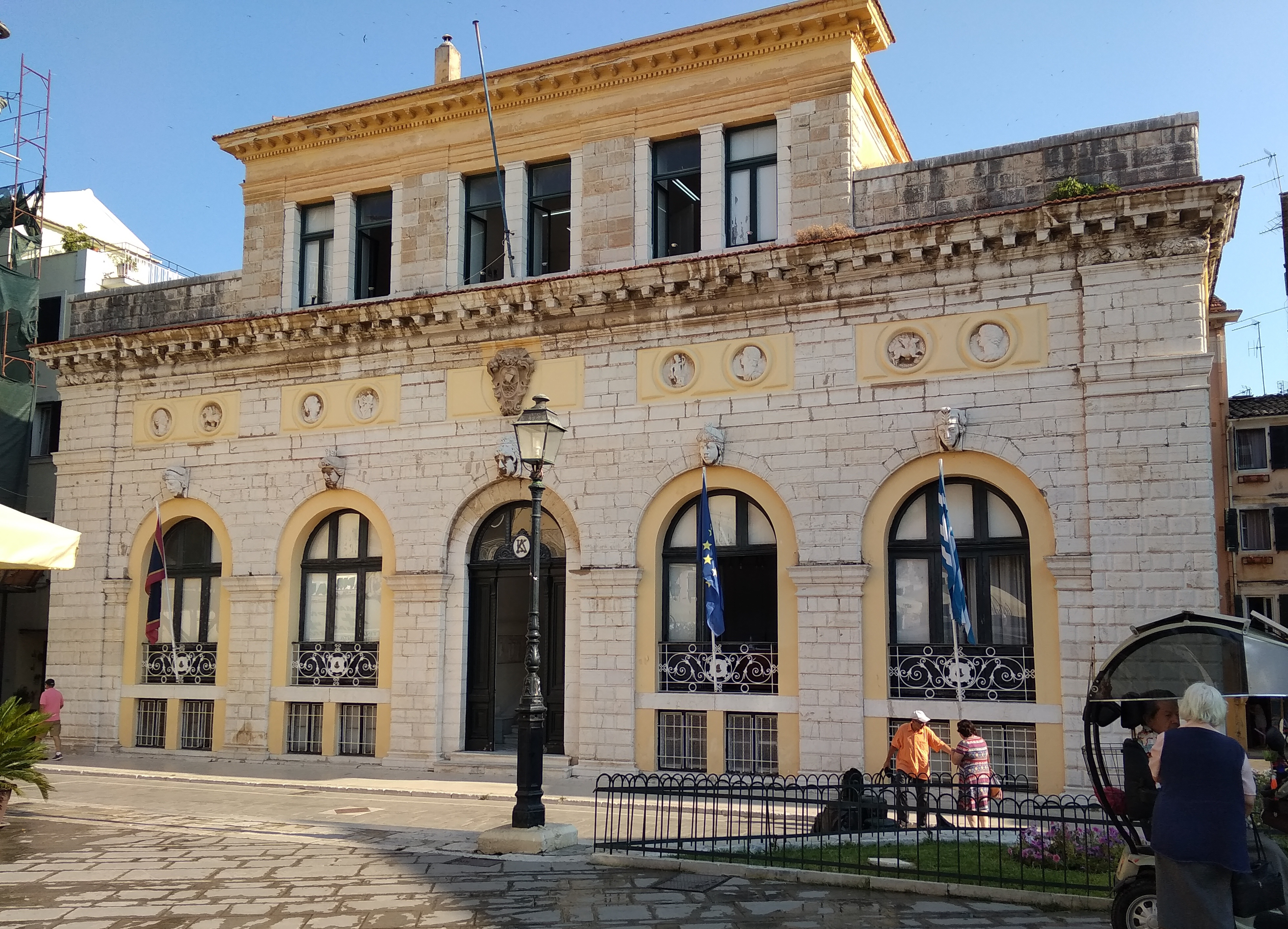 Άποψη του Δημαρχείου της Κέρκυρας